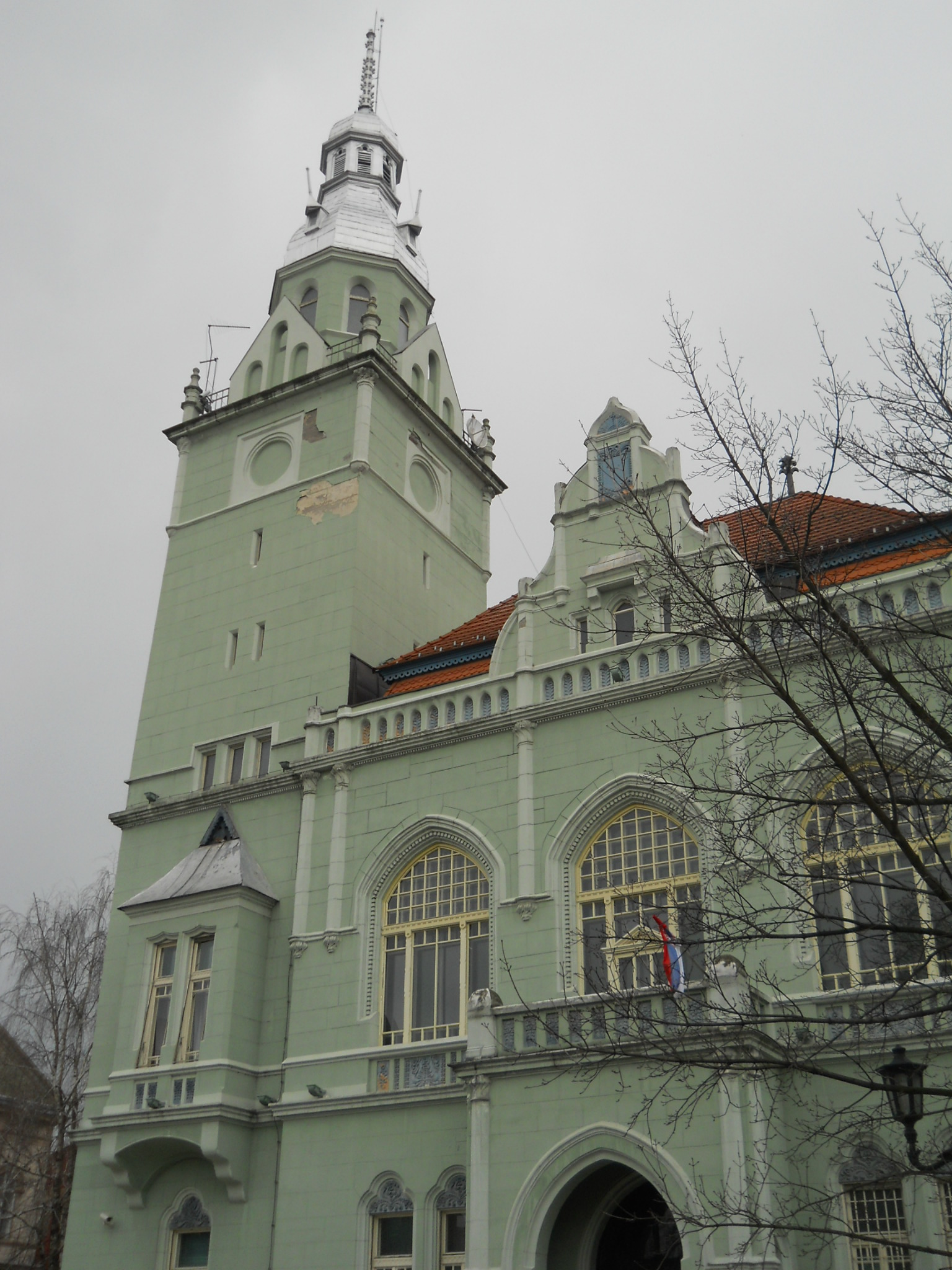 Apatin - városháza